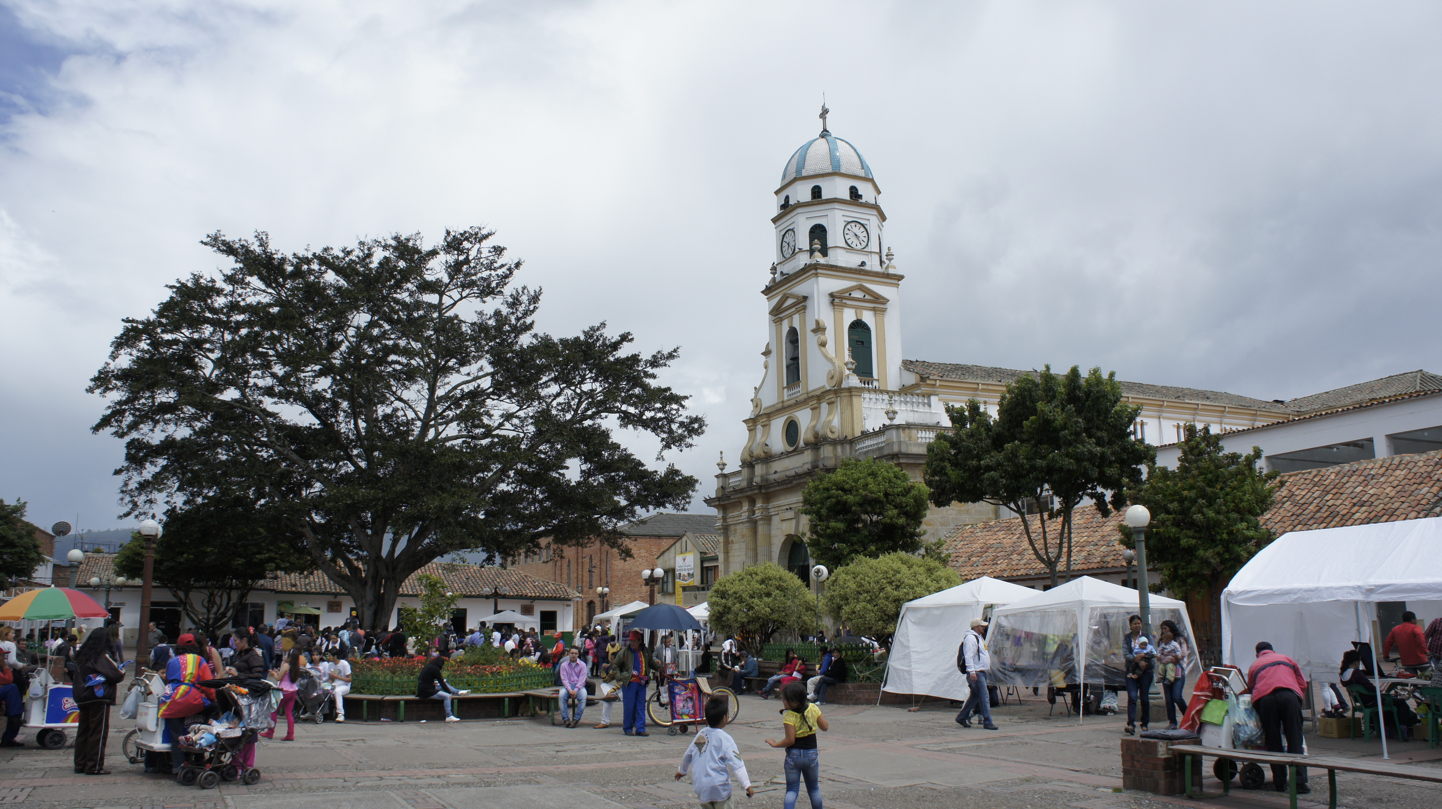 Chia